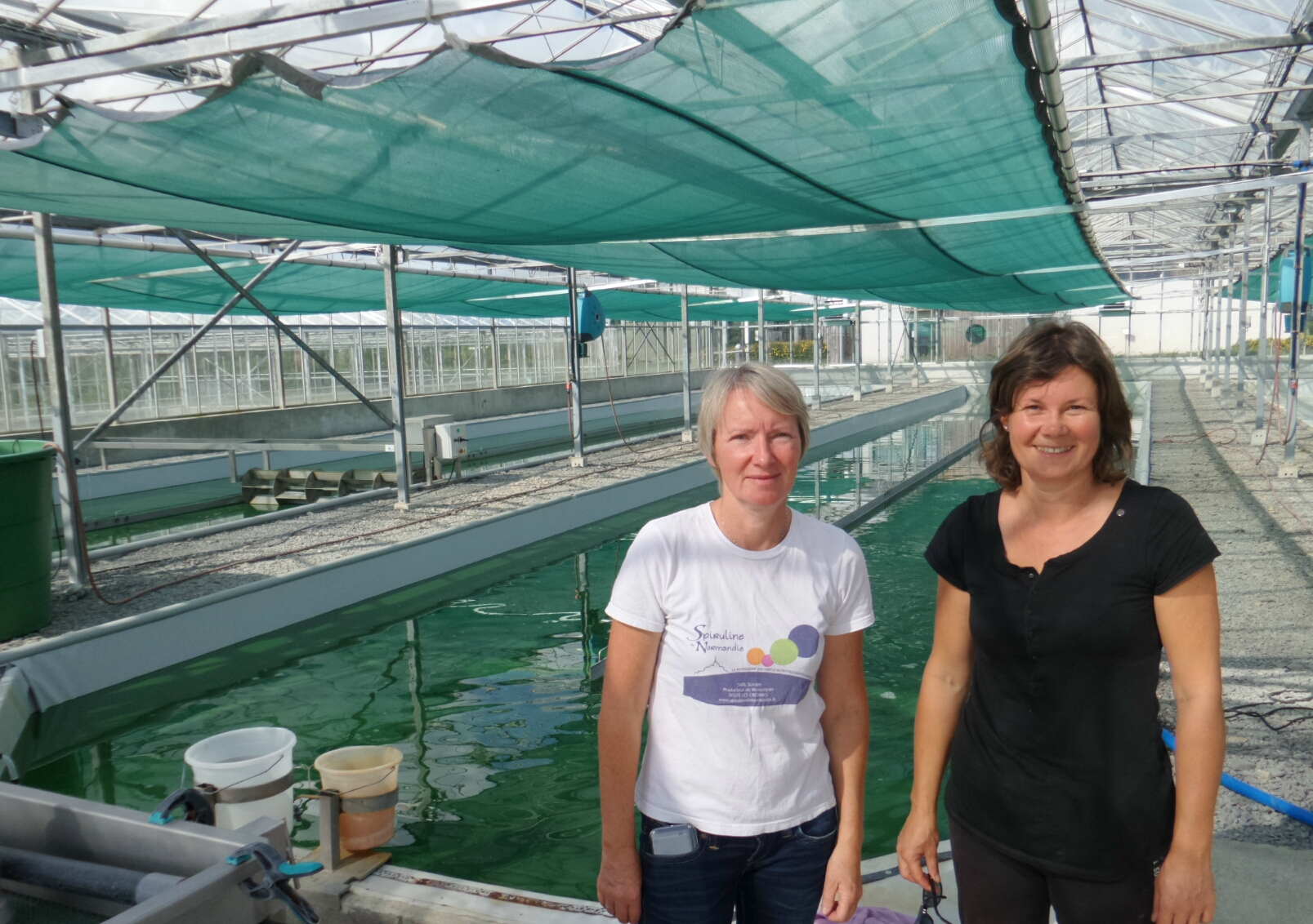 La société Scirsée produit de la spiruline en Normandie toute l'année en récupérant la chaleur dissipée lors de la conversion du biogaz (issu de la fermentation de déchets agricoles) en énergie électrique.